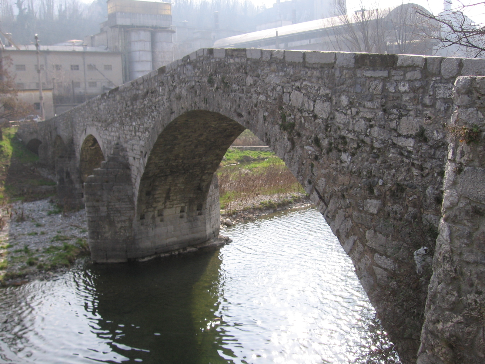 Albino, ponte romanico, Bergamo, Italy